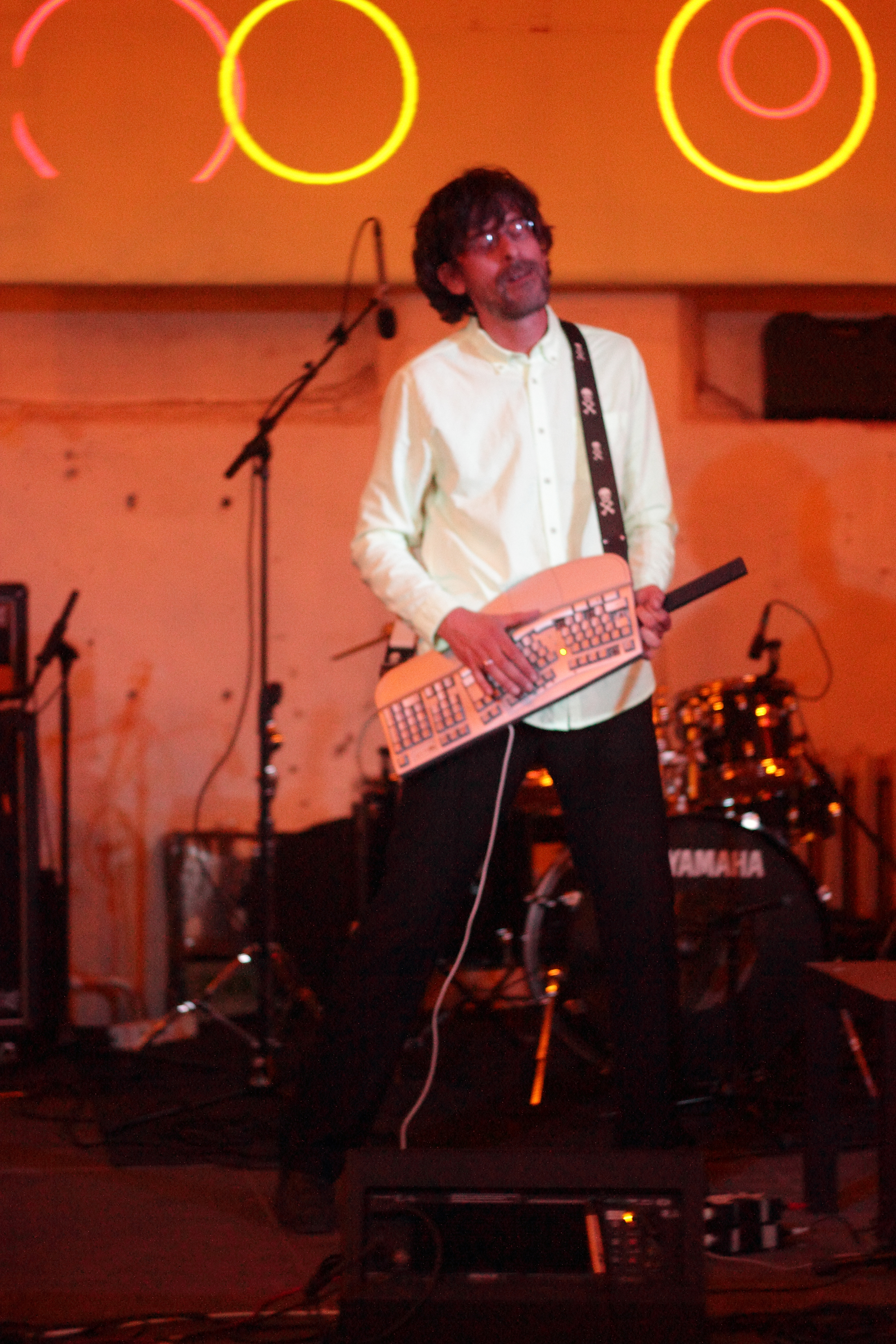 Алексей Шульгин со своим музыкальным проеком 386 DX на концерте в рамках выставки "Тишина это смерть" 19 июня 2012 года в Artplay.